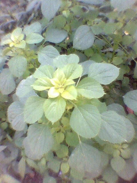 குப்பைமேனி